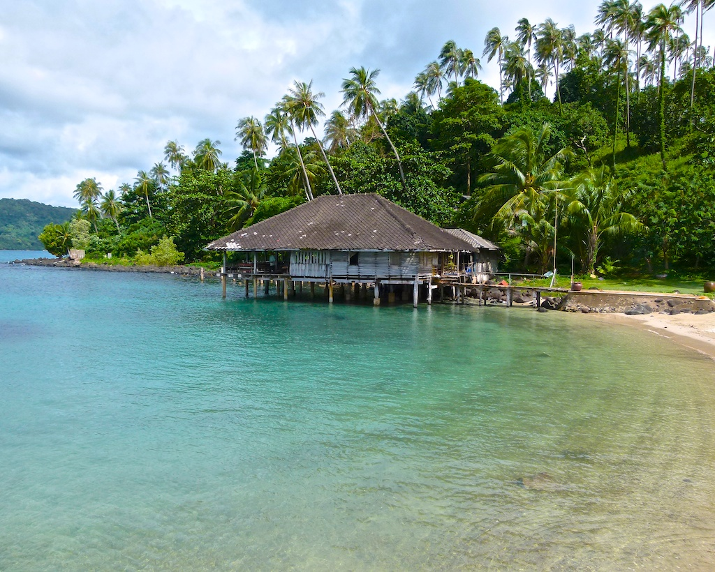 Ko Maisie, Thailand